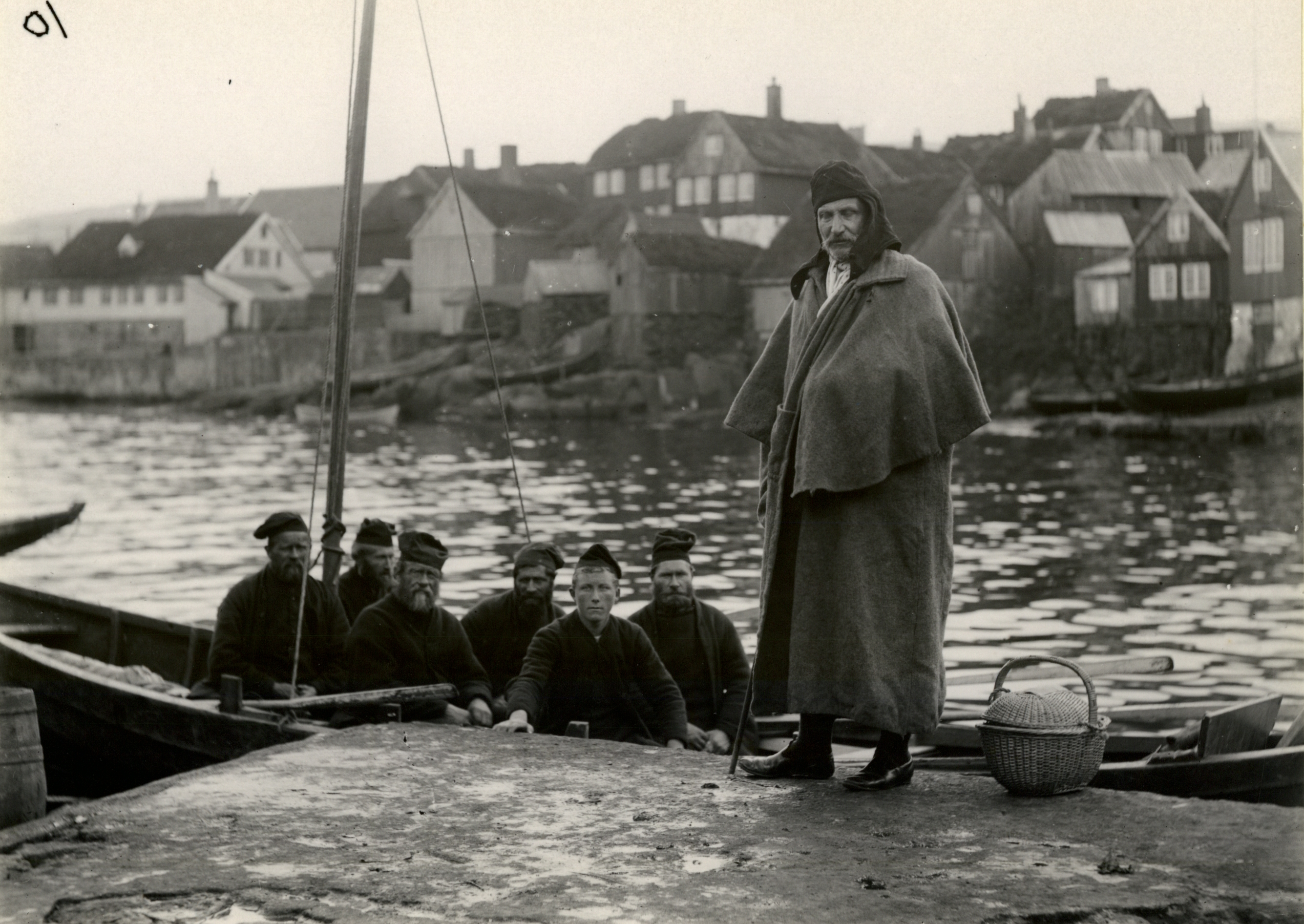 Overlærer Louis Bergh ved affarten fra Torshavn til inspektion af skoler på bygden. Skydsbåden venter ved kajen.